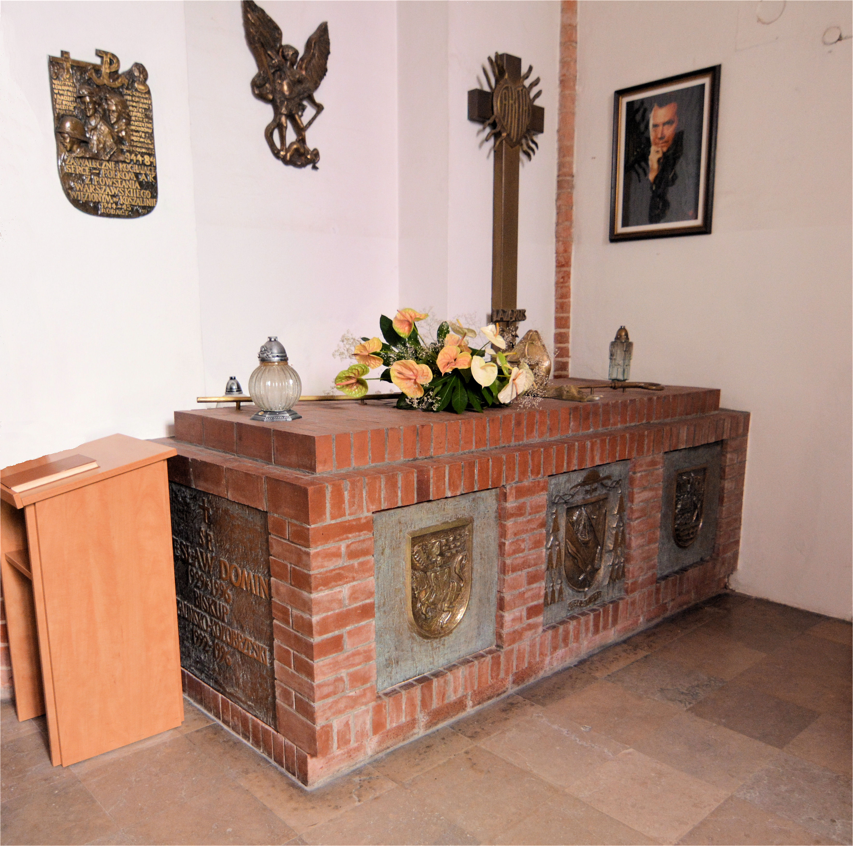 Koszalin, Katedra p.w. Niepokalanego Poczęcia NMP, 1300-1333